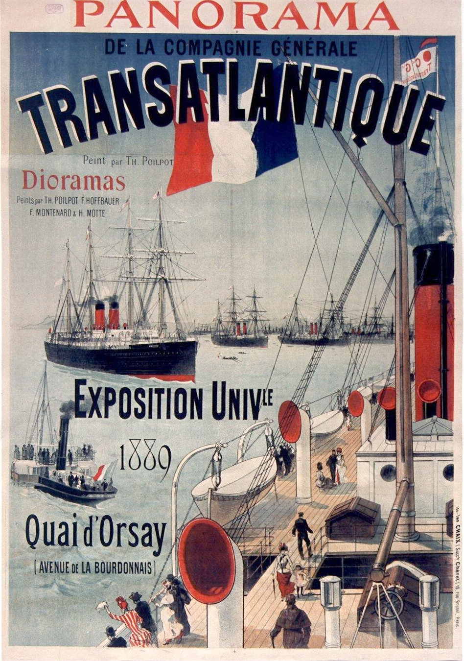 Panorama de la Compagnie générale transatlantique peint par Théophile Poilpot. Dioaramas. Exposition universelle 1889, quai d'Orsay: (affiche / non signée)